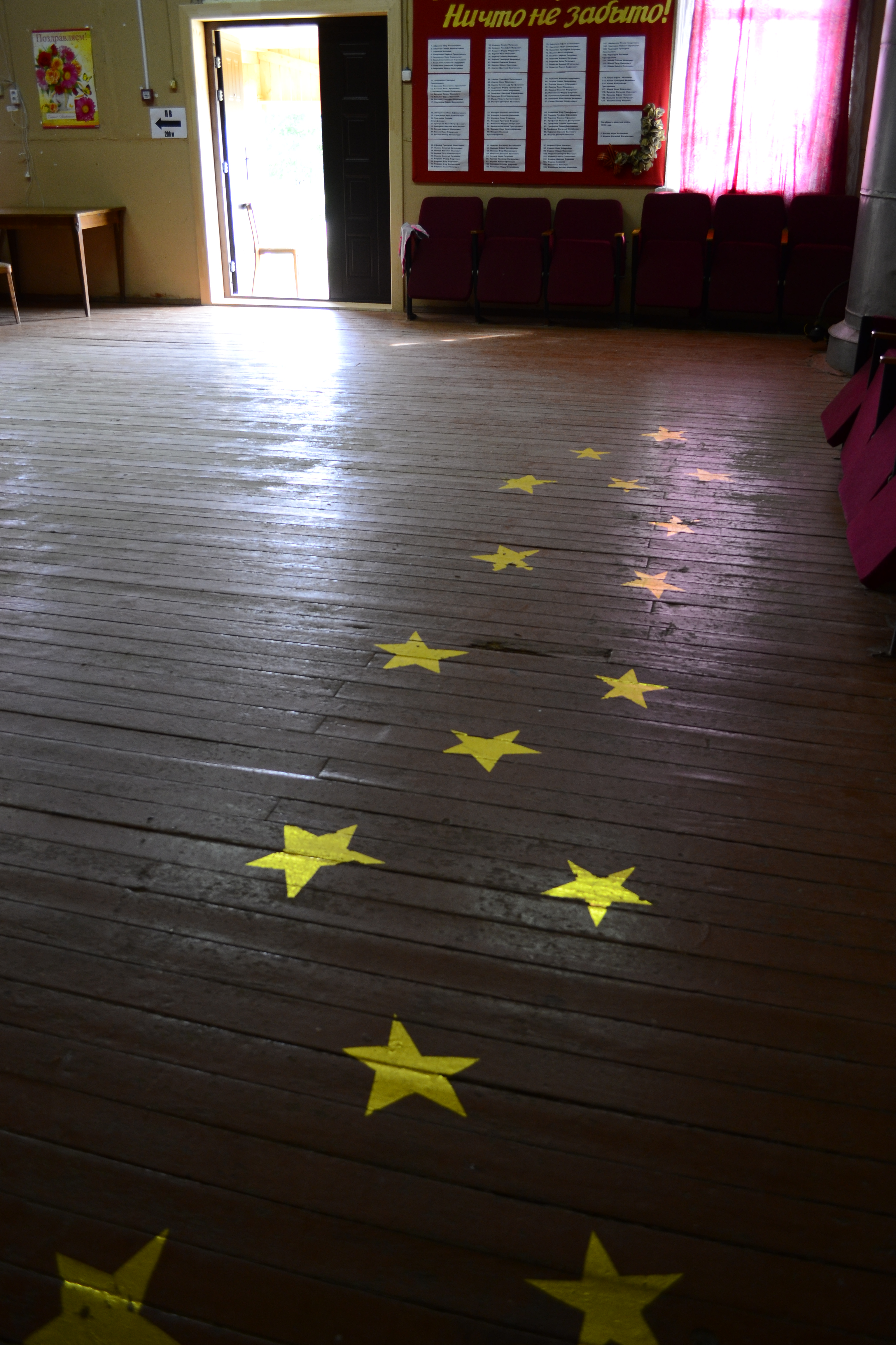 Ladva klubihoone sisevaade - põrand